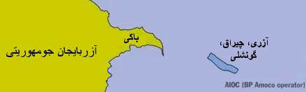 تۆرکجه: آزری-چیراق-گونشلی نفت و قاز یاتاقلاری